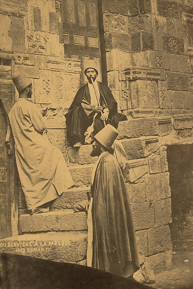 Derviches à la mosquée (Damas). Dervishes at the mosque 5damascus).